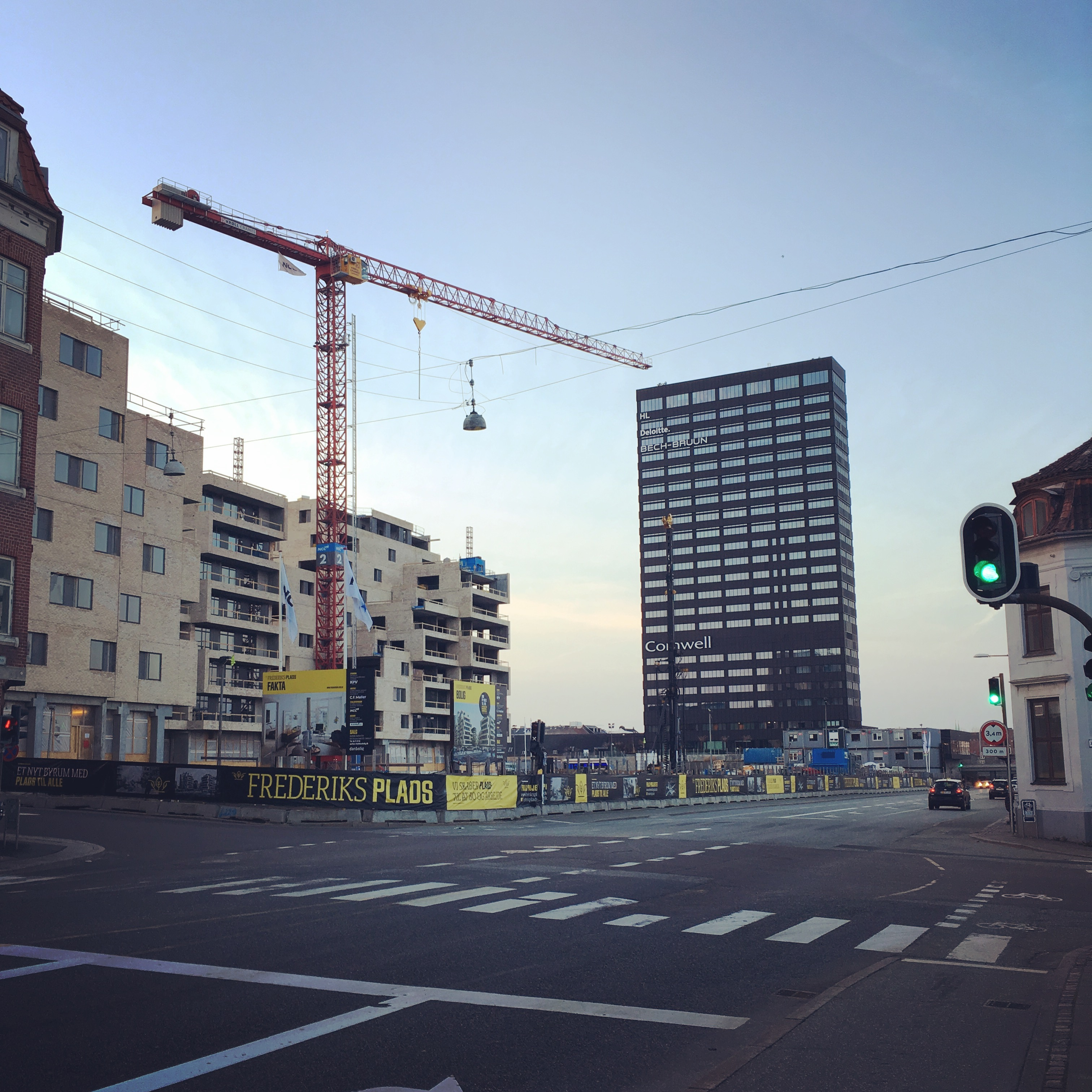 Det kommende Frederiks Plads med Aarhus City Tower i baggrunden.